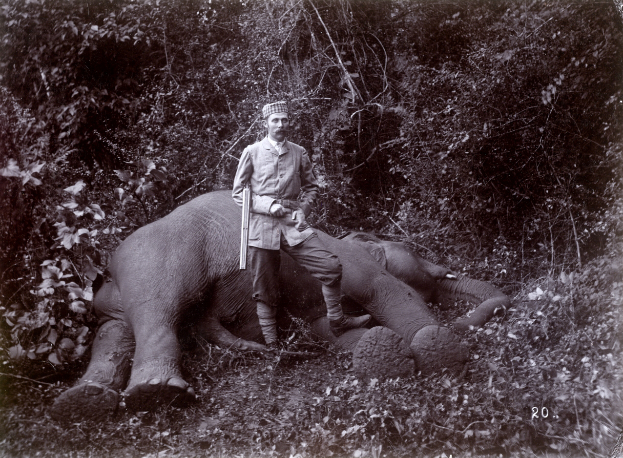 Franz Ferdinand von Österreich-Este auf Elefantenjagd Ceylon: Kalawewa. „Der erste Elefant“ Ehzg Franz Ferdinand allein vor dem Bauch des erlegten Elefanten stehend, erigierter Penis des Elefanten (auf Bild 18 und 19 mit Zweigen verdeckt).